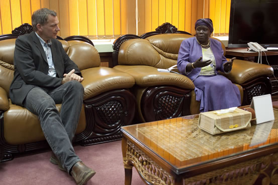 Das Foto zeigt Jan van Aken im Gespräch mit Ann Itto, der Landwirtchaftsministerin für den Südsudan, die der ehemaligen Rebellenbewegung SPLM angehört. Insbesondere die Ernährungssituation im Südsudan ist katastrophal. Bis heute sind 40 % der Südsudanesen von Nahrungsmittelhilfen der UN abhängig. Foto: DIE LINKE / Karin Desmarowitz